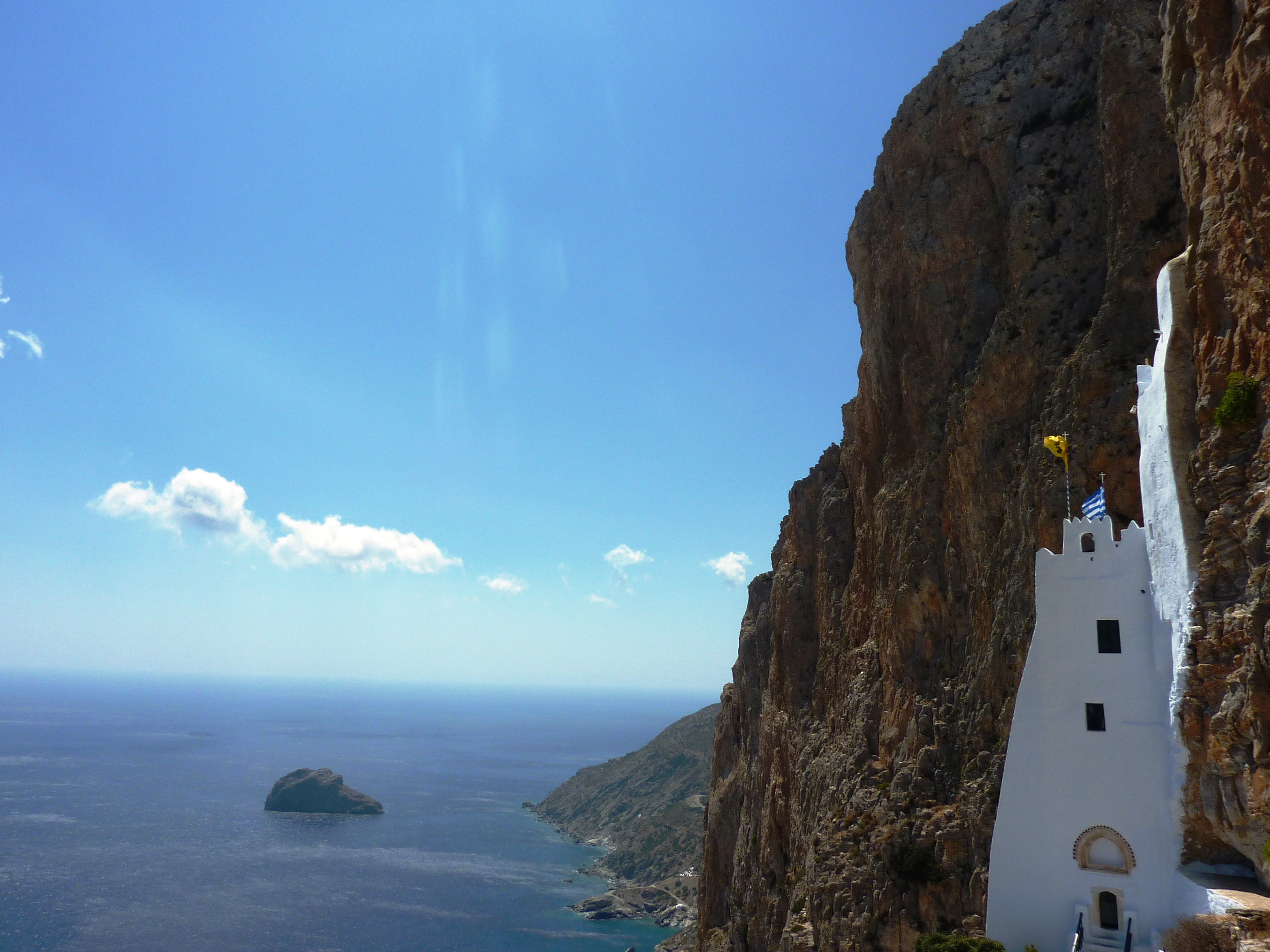 Παναγία Χοζοβιώτισσα«Μονή της Παναγίας της Χοζοβιώτισσας»